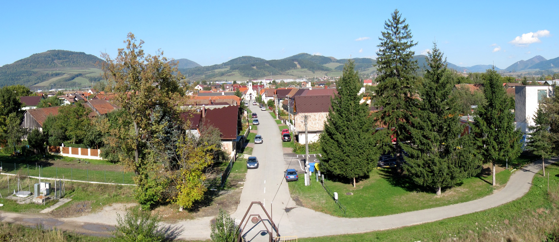 Pohľad na Mojš z hrádze